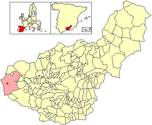 Situación de la localidad de Venta del Rayo (en el municipio de Loja) respecto a la provincia de Granada, en España.